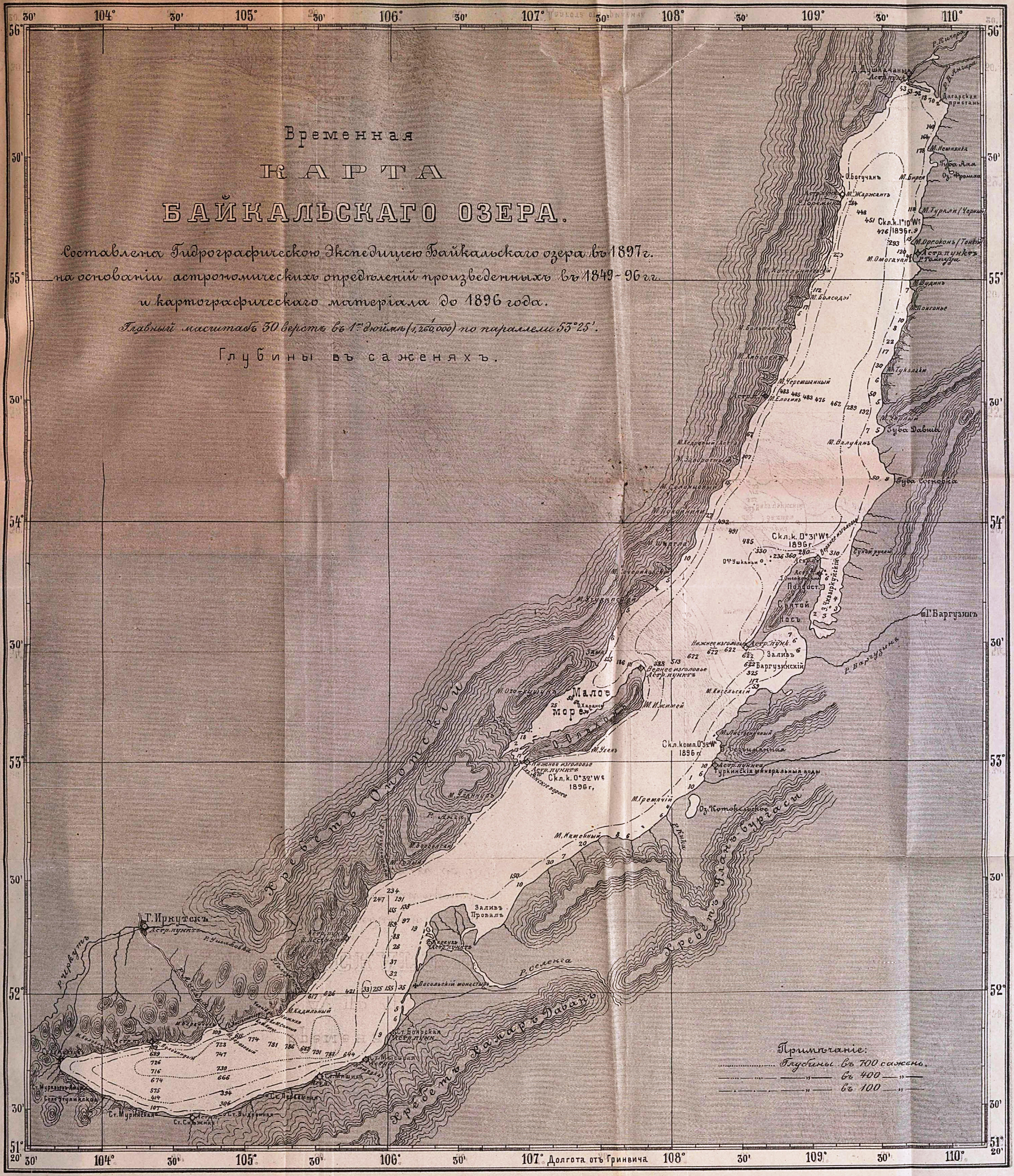 Карта Байкала 1897 года